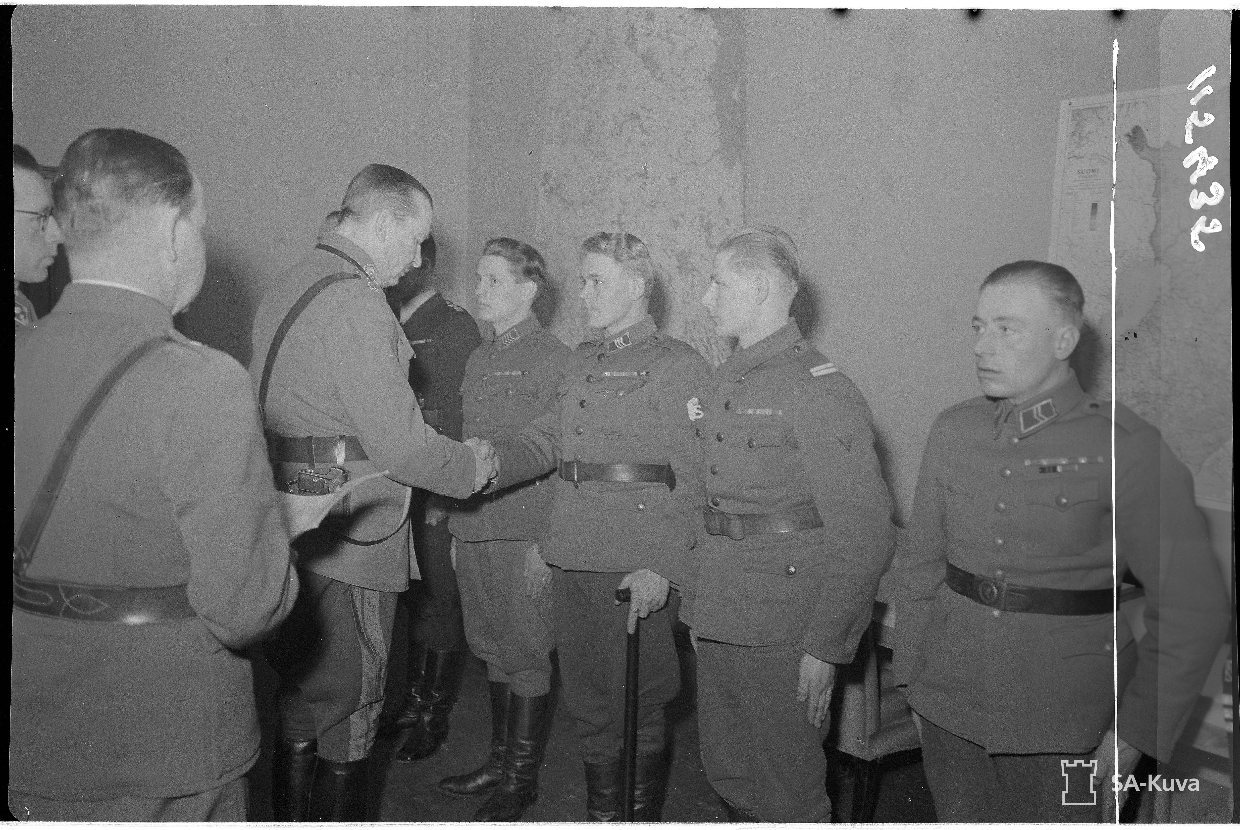 Suomen Marsalkka onnittelee kersantti Toivo Mannista ojennettuaan hnelle ritariristin. Manninen on sotavammainen. Mannisesta vas. ylikersantti Antti Vorho ja oikealla alikersantti Paavo Paajanen.